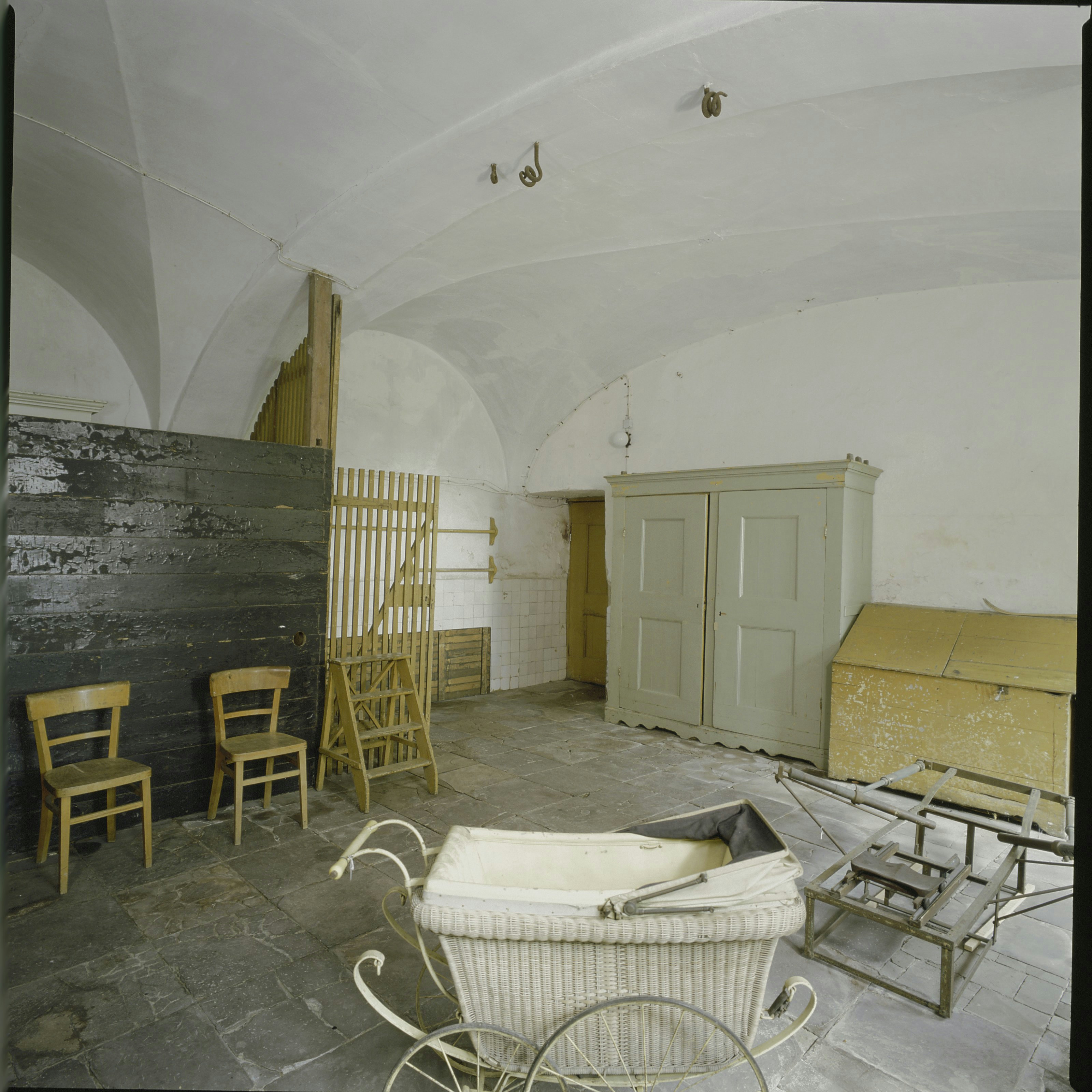 Kasteel Amerongen: Interieur, overzicht van de waskeuken in het onderhuis (opmerking: fotodocumentatie interieurs vóór de conservering.)